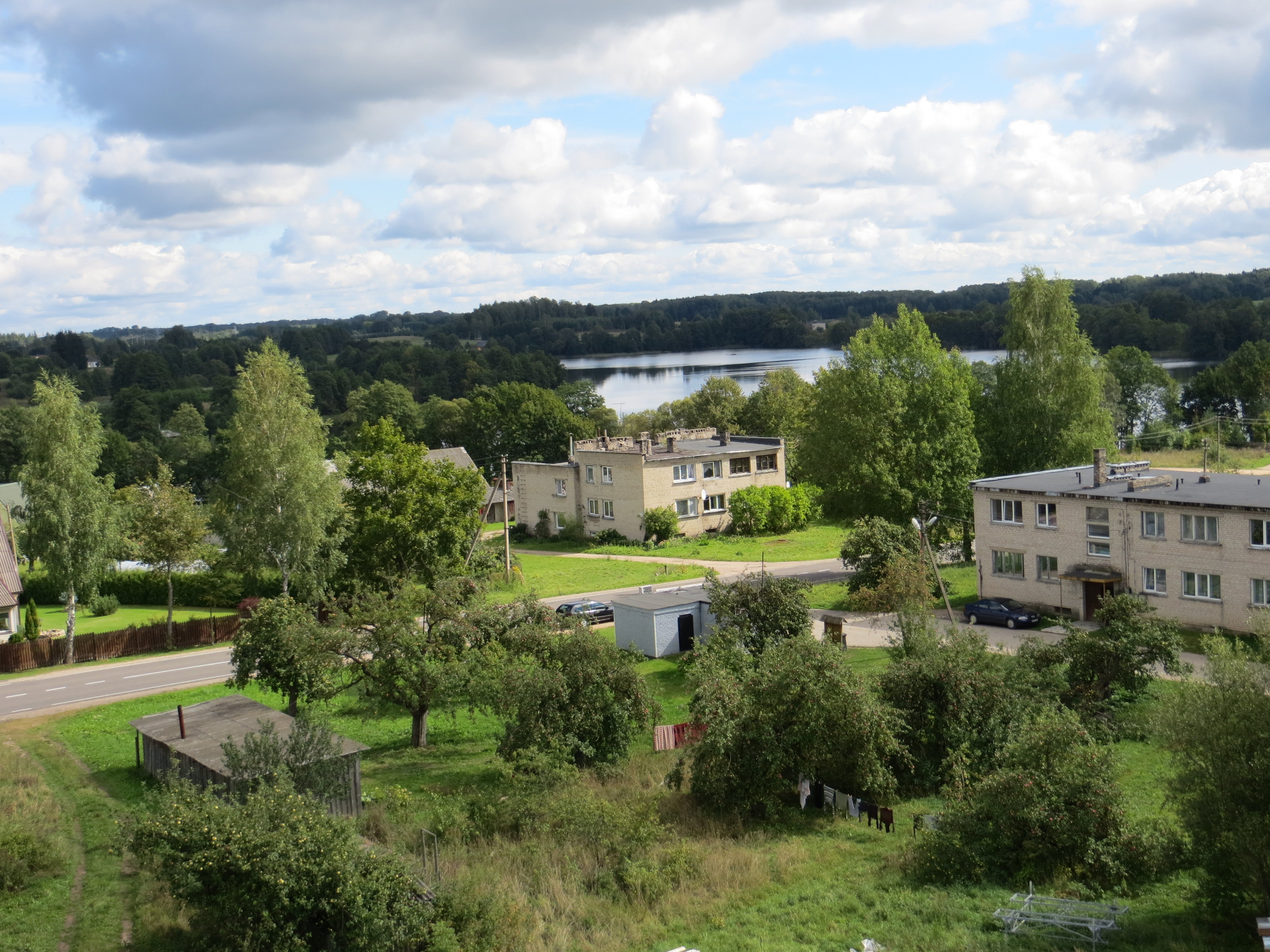 Dūkšteliai, Lithuania